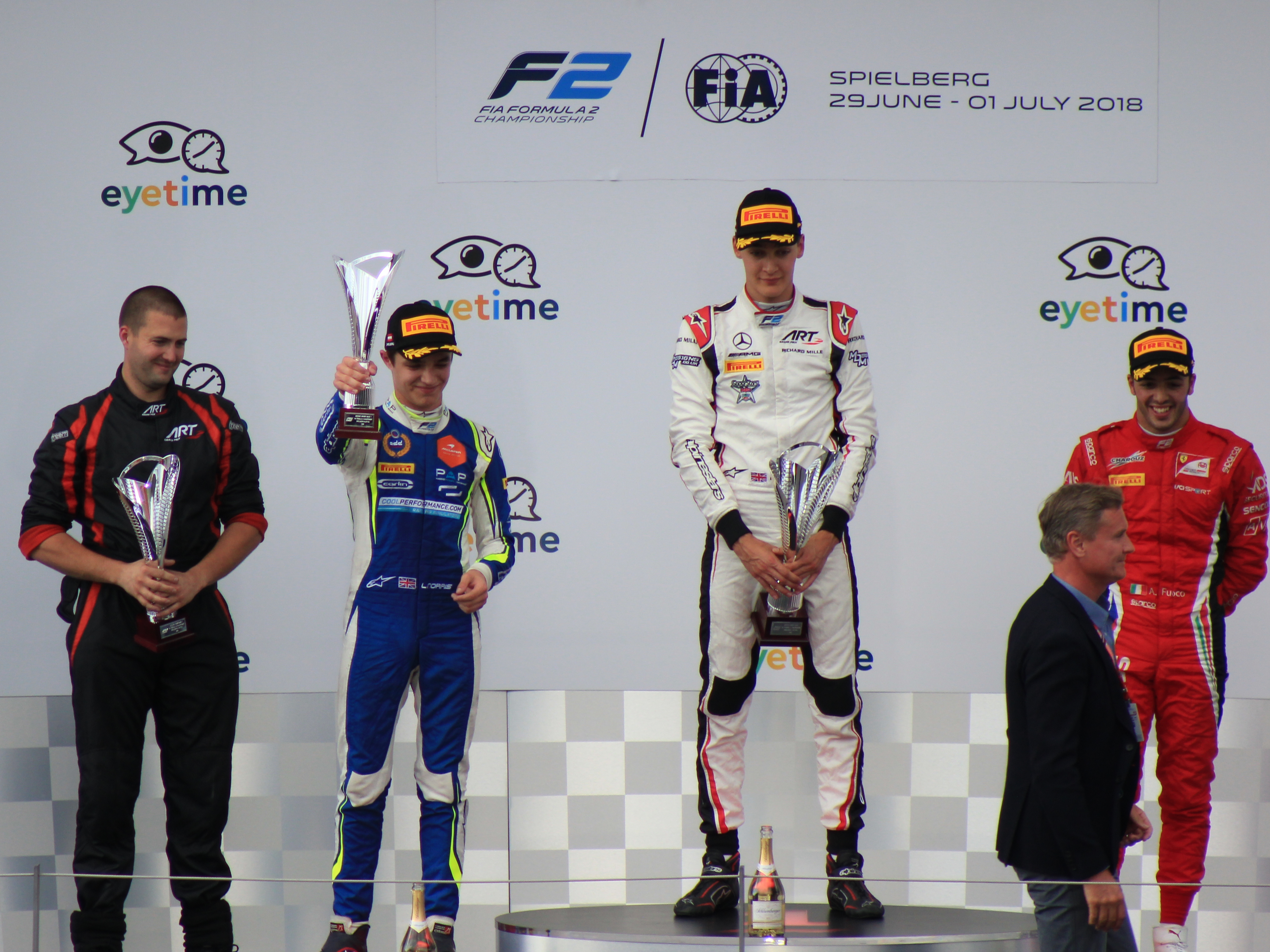 Nach dem ersten Rennen in Österreich 2018